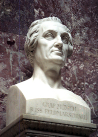 Бюст Миниха в Валхалле